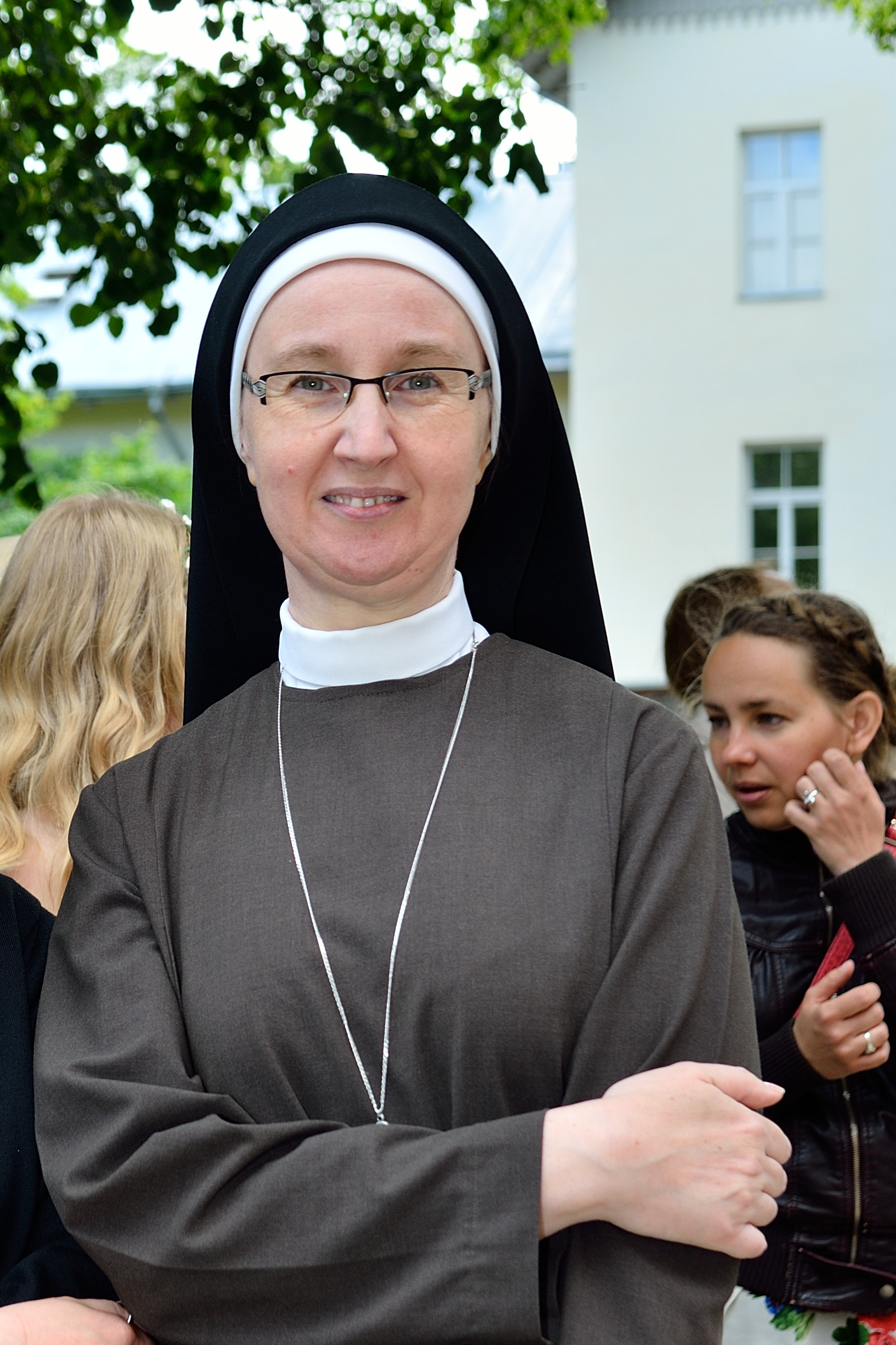 Õde Veronika Tartu Katoliku Hariduskeskus aktusel Toomemäel